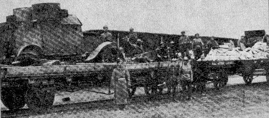 Pociag pancerny Zwiazek Broni 1918